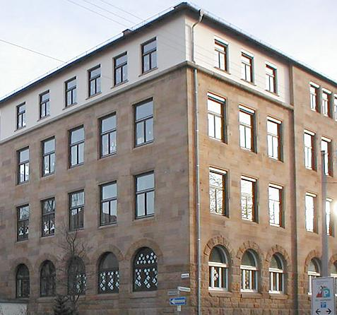 Dammrealschule in Heilbronn